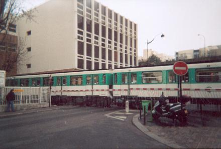 Passage à niveau, rue de Lagny , dans le 20earrondissement de Paris